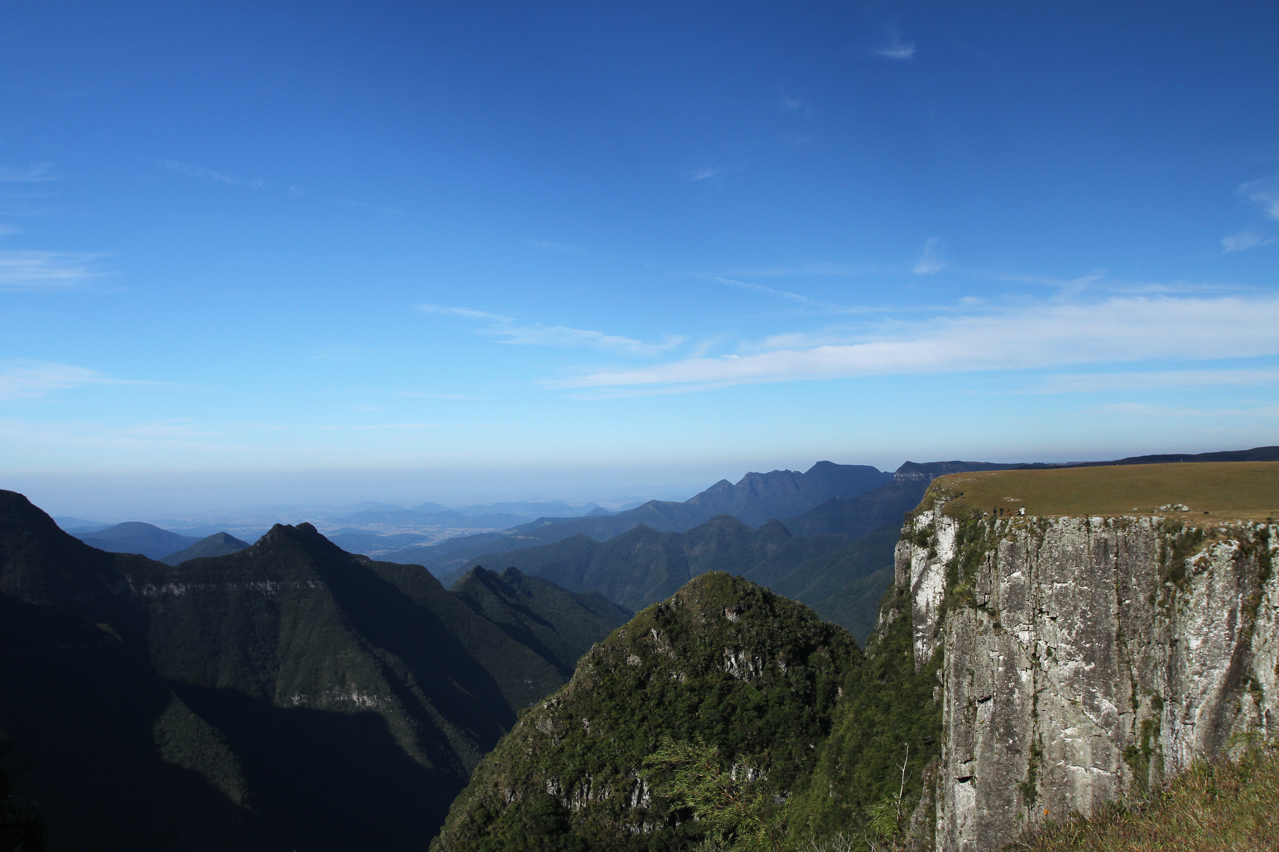 Aparados da Serra - São José dos Ausentes - Rio Grande do Sul